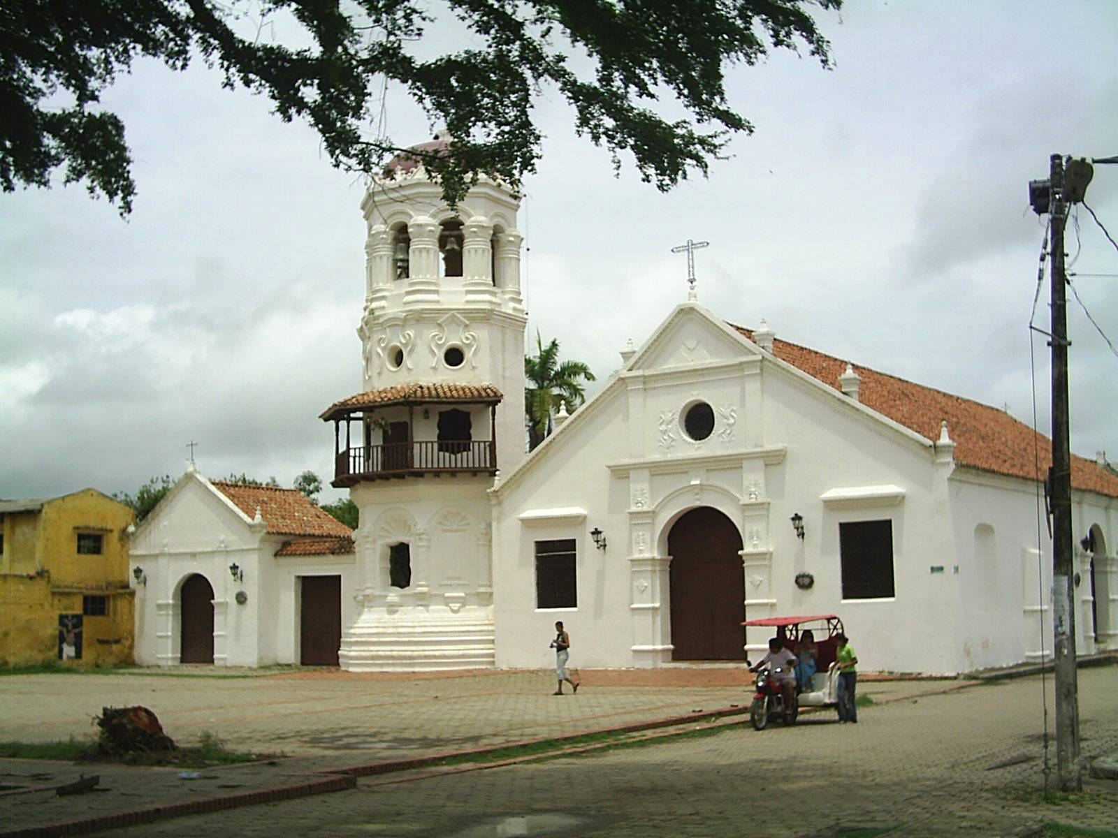 Iglesia de Santa Bárbara en Mompox